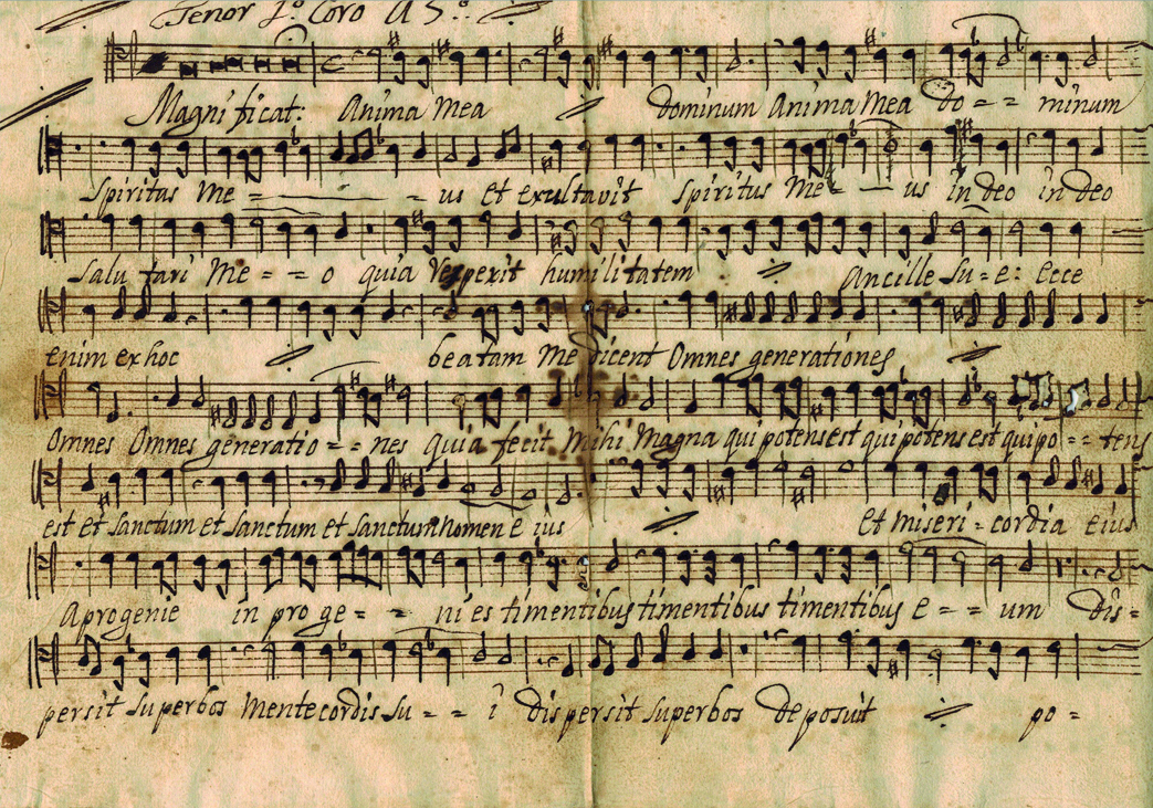 Particella del tenor del primer cor del Magníficat de Pau Llinàs c.1714. APSMP Música